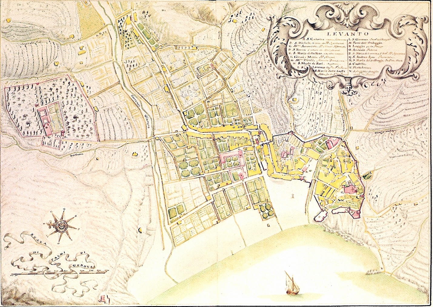 Mappa raffigurante il borgo di Levanto (La Spezia) del cartografo Matteo Vinzoni nel 1773